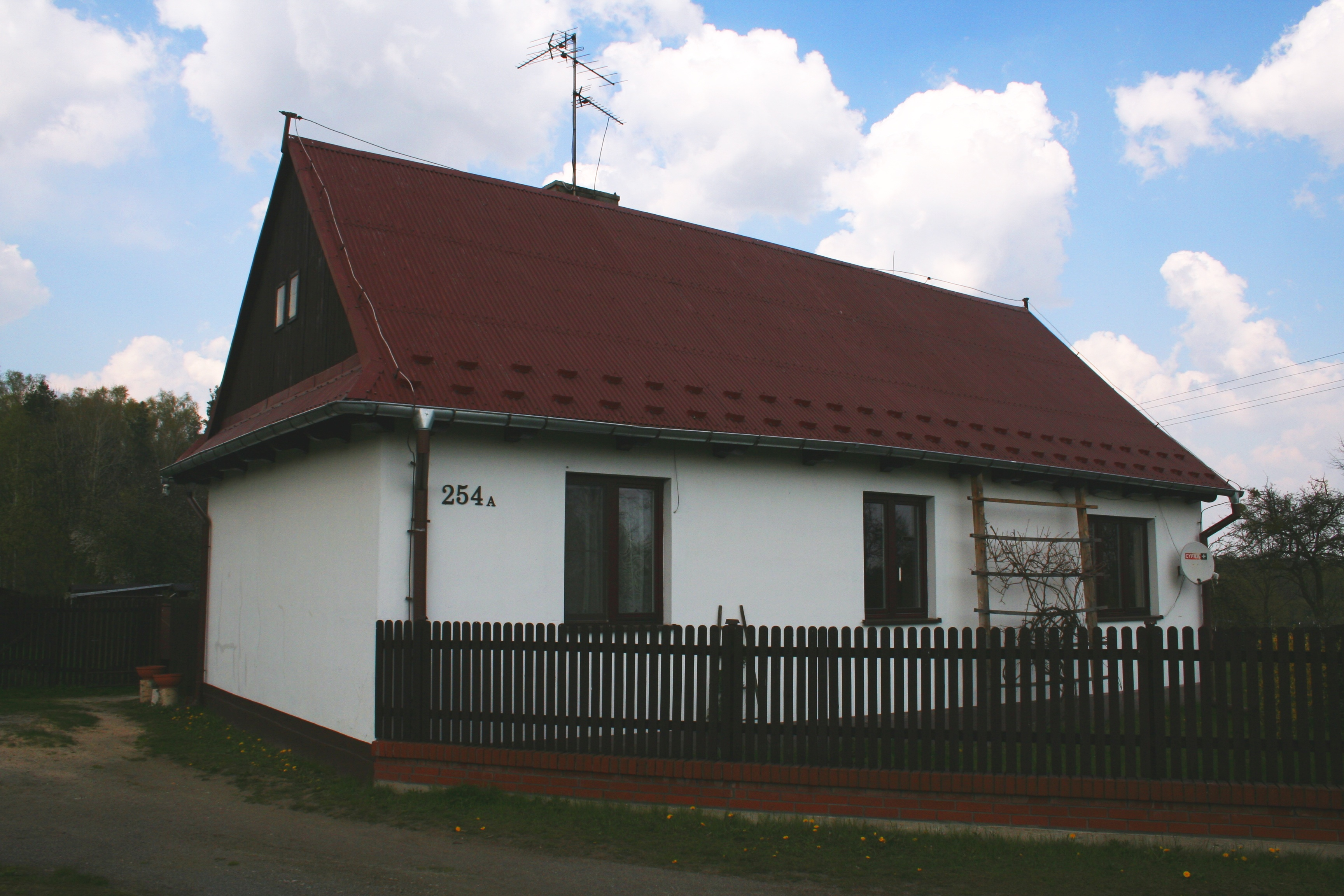 Leśniczówka w miejscowości Hutki, Polska, województwo śląskie, powiat częstochowski